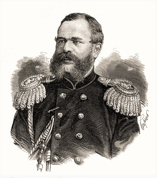 Nikolaj Nikolaevič Obručev